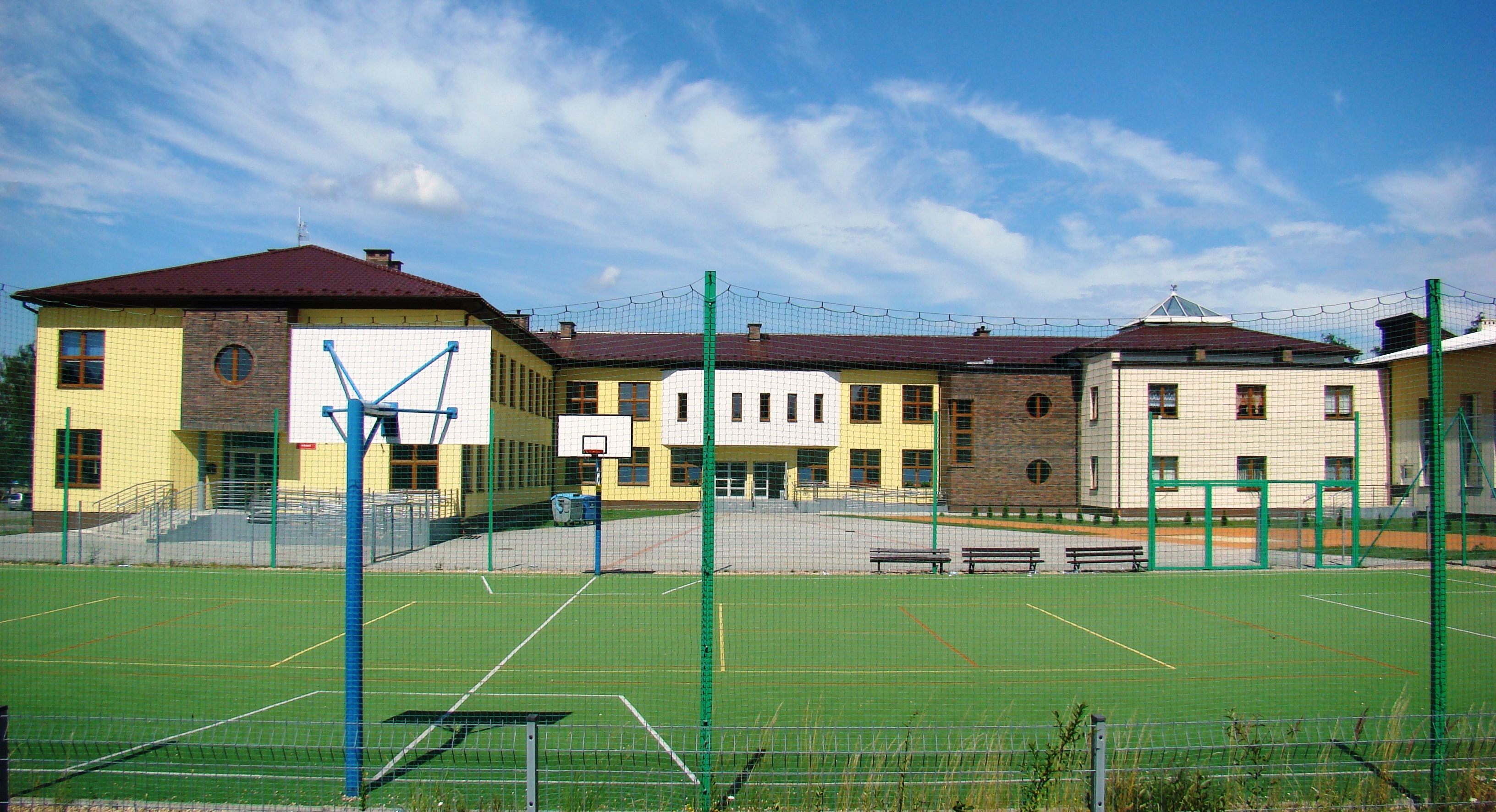 Miejsko-Gminna Biblioteka Publiczna i Gimnazjum im. Jana Pawła II w Żarkach